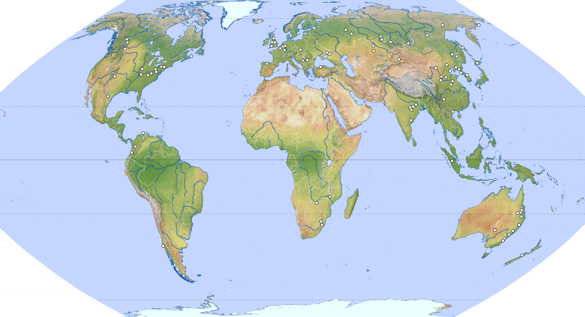 Fördergebiete / Lagerstätten für Steinkohle